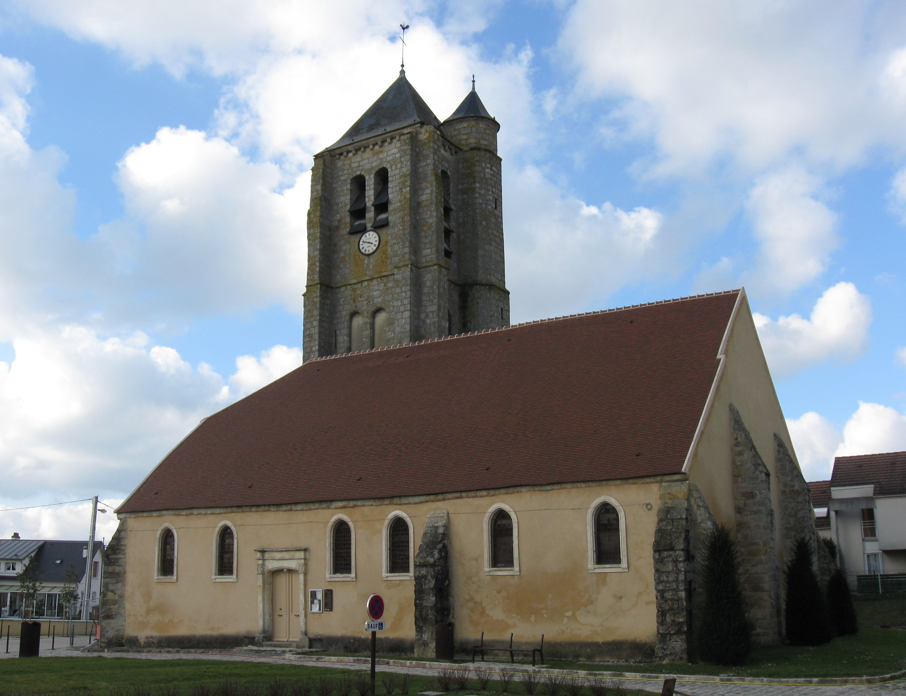 Église Saint-Lambert de Varennes-sur-Seine. (Seine-et-Marne, région Île-de-France).